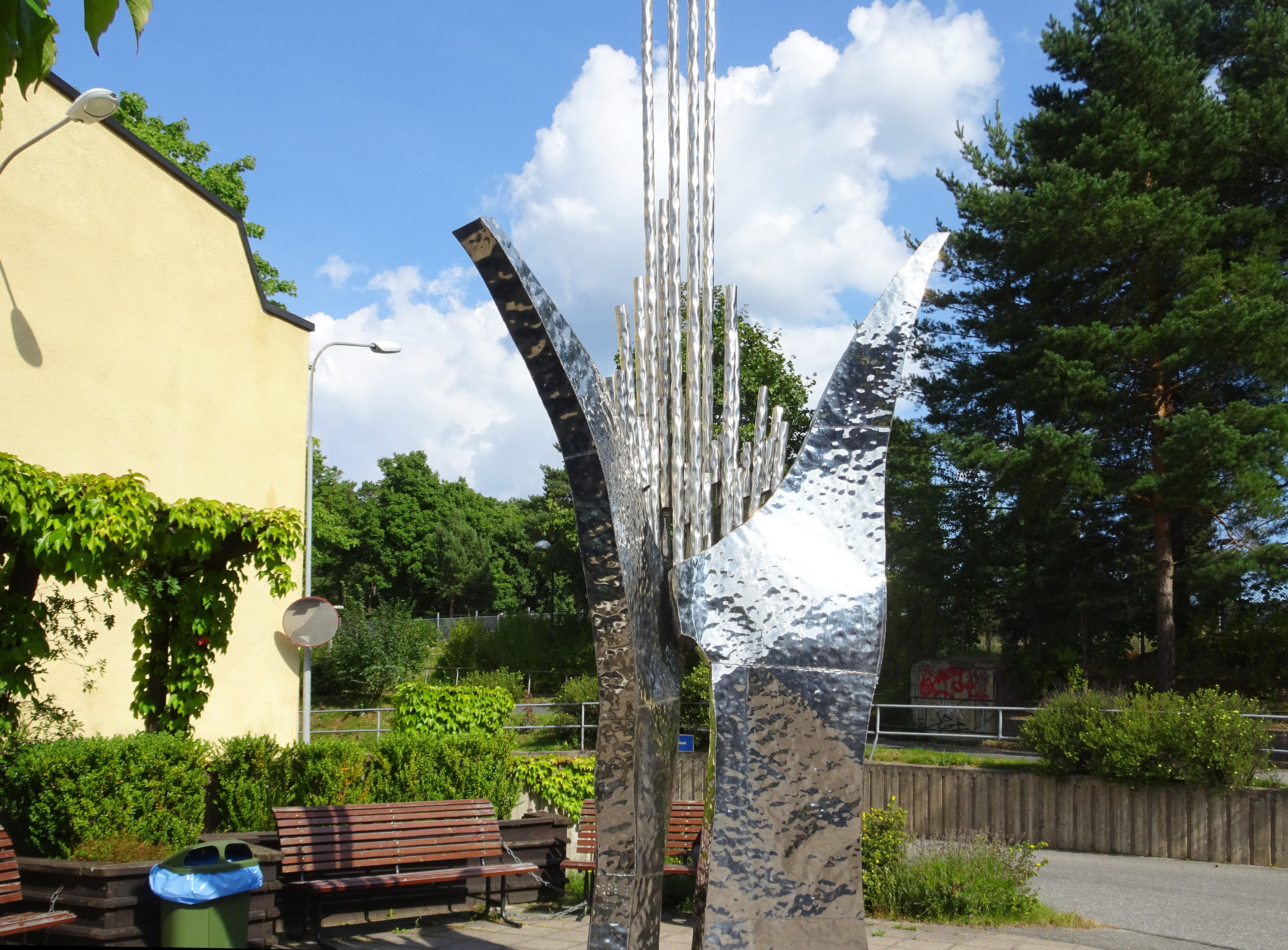 Skulptur "Orgelfjärilen" av Björn Erling Evensen, utanför Synskadades riksförbund, Sandsborgsvägen 52